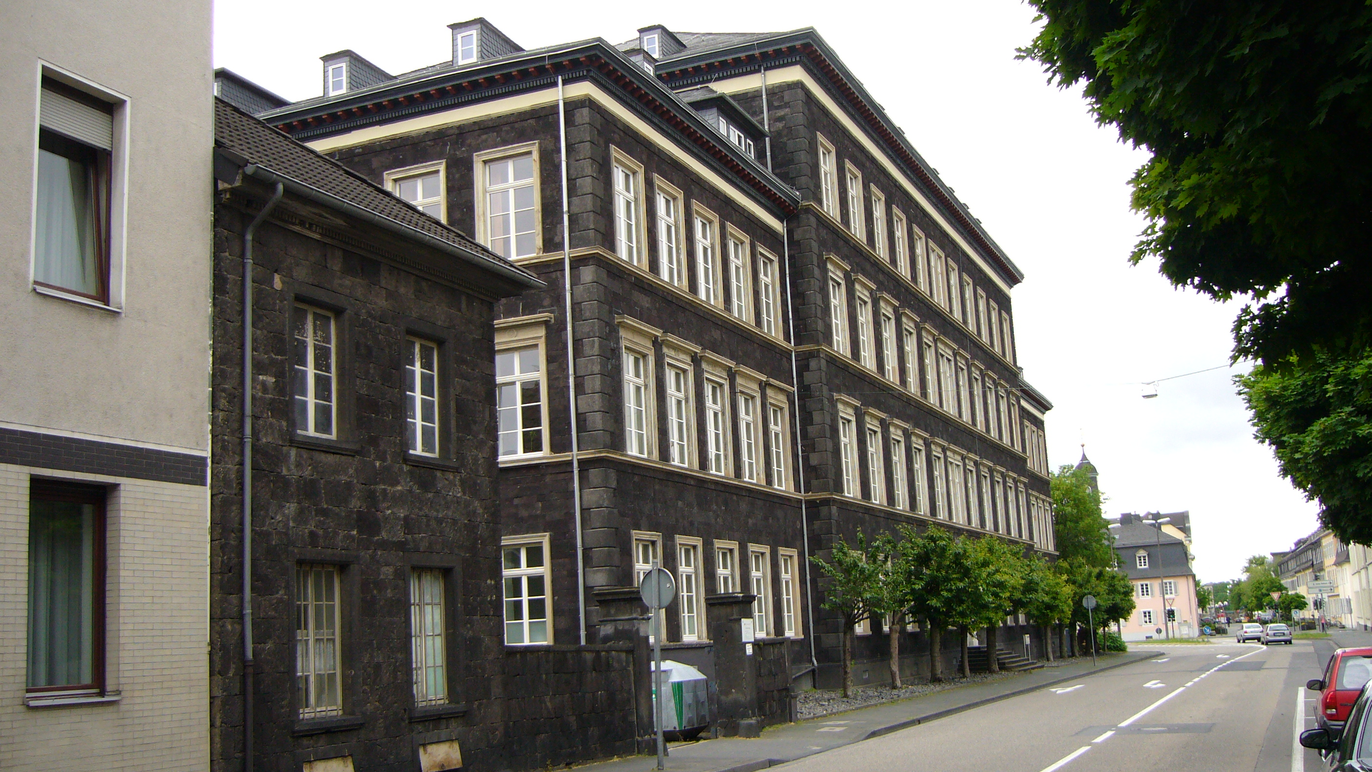 Lebensmittelfachschule